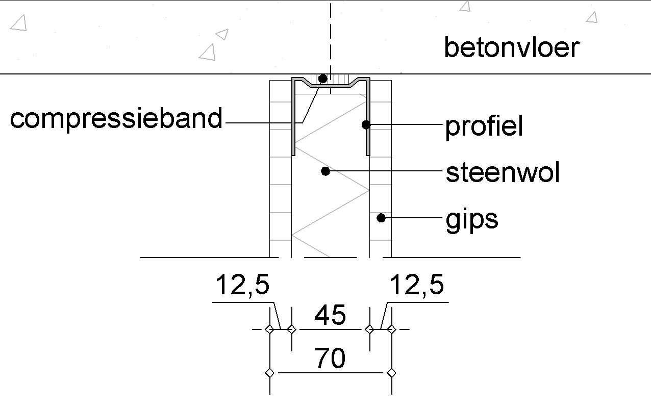 metalstudwand